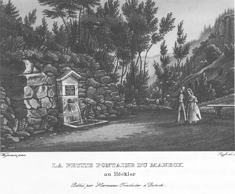 Maneggbrunnen in Zürich Leimbach. Aqua tinta von Weymann, gestochen von Hegi und Siegfried. Zürich 1840